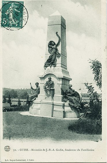 Guise : Mausolée de Godin, fondateur du Familistère